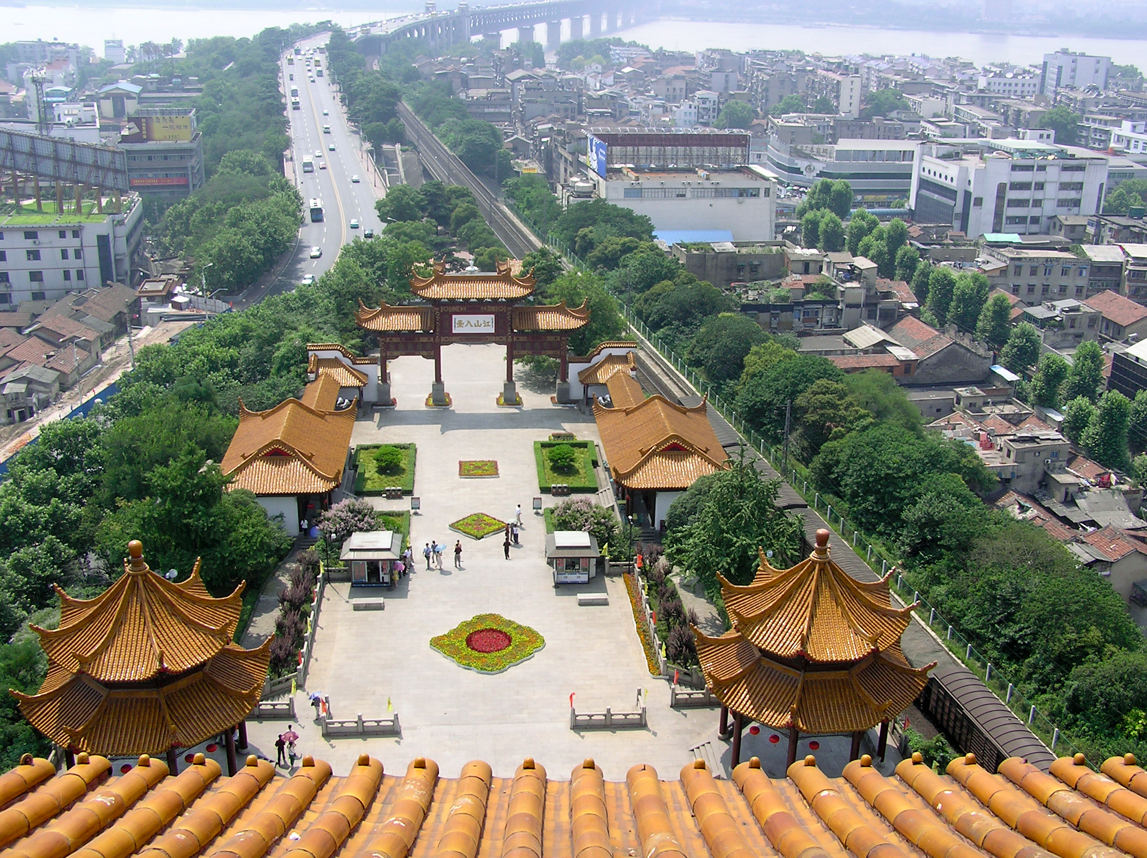 Pagode de la Grue Jaune - Wuhan (Chine) - Vue sur le pont du Yangtzé depuis la pagode